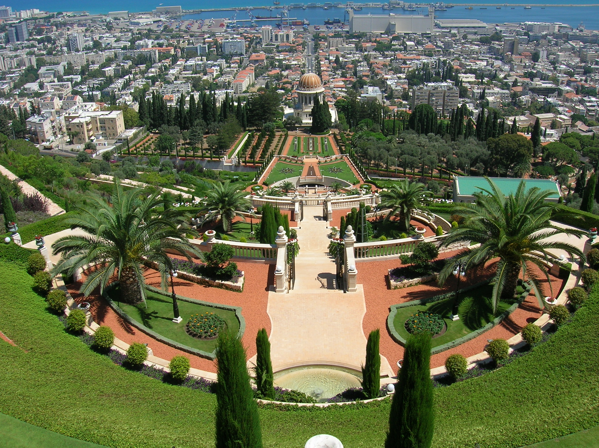 Israel - Haifa - Bahai Gardens 004